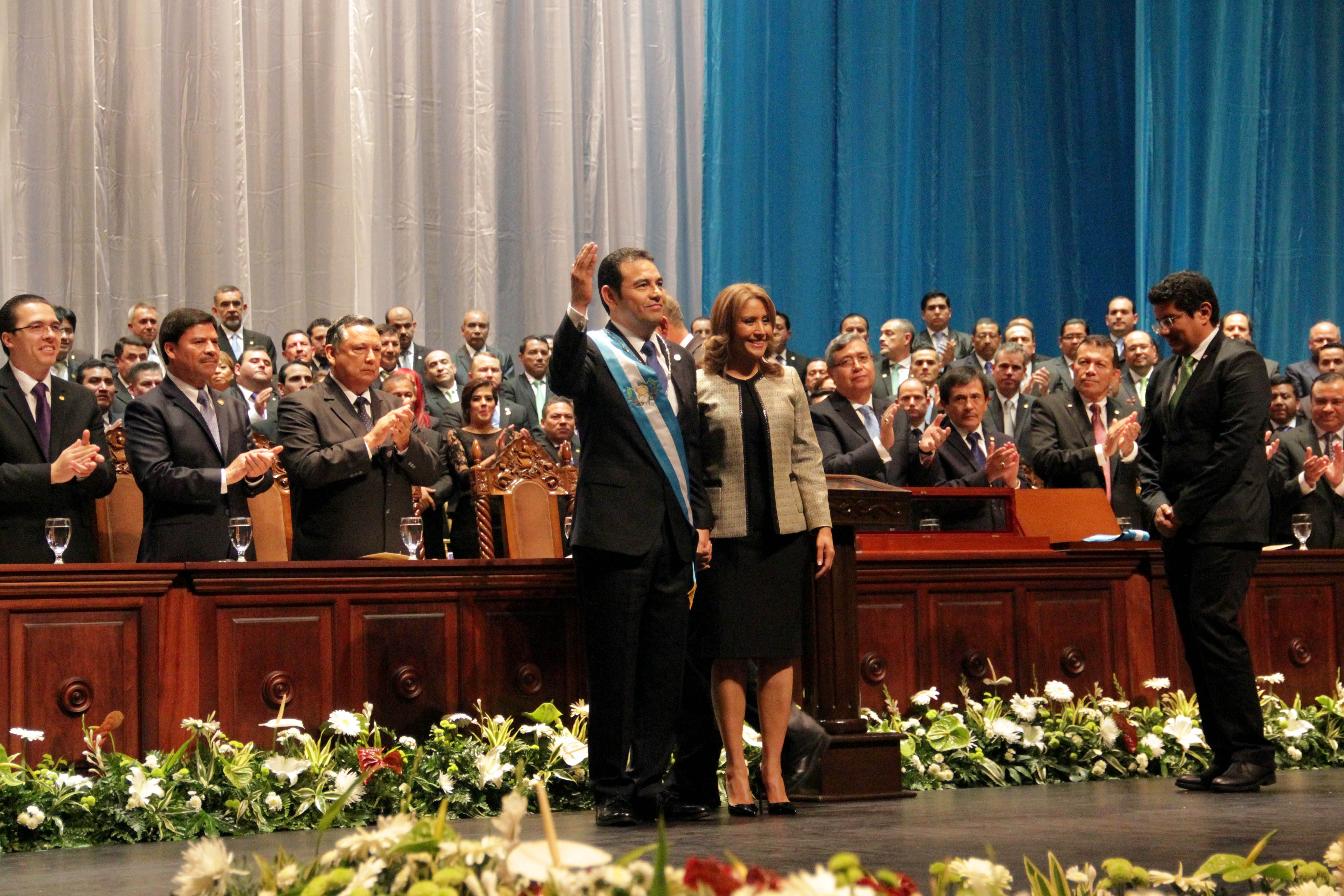 Presidente de Guatemala Jimmy Morales y su esposa.